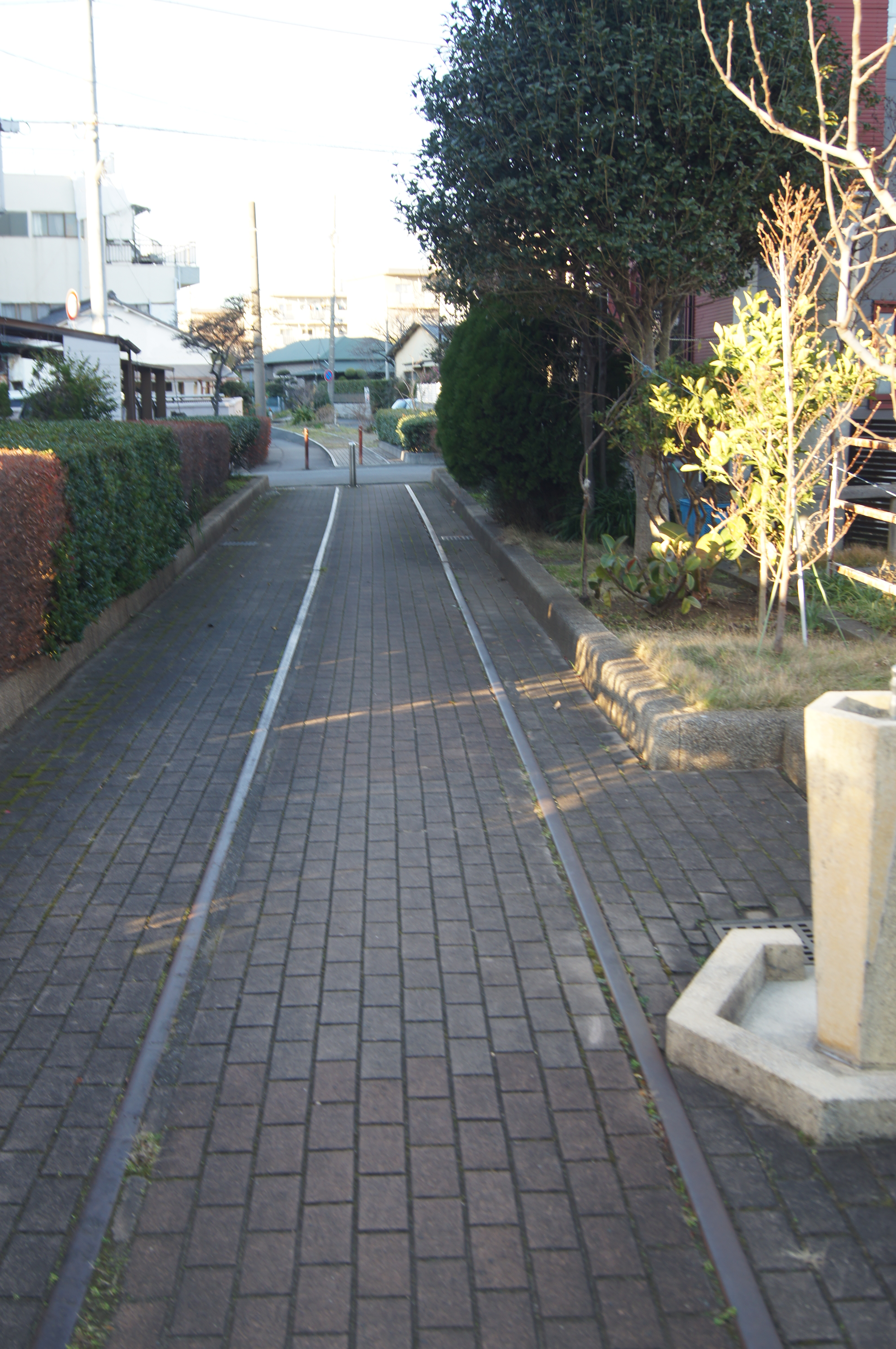 沼津市の蛇松緑道。沼津港駅へ向かう貨物支線の跡地を転用した遊歩道。